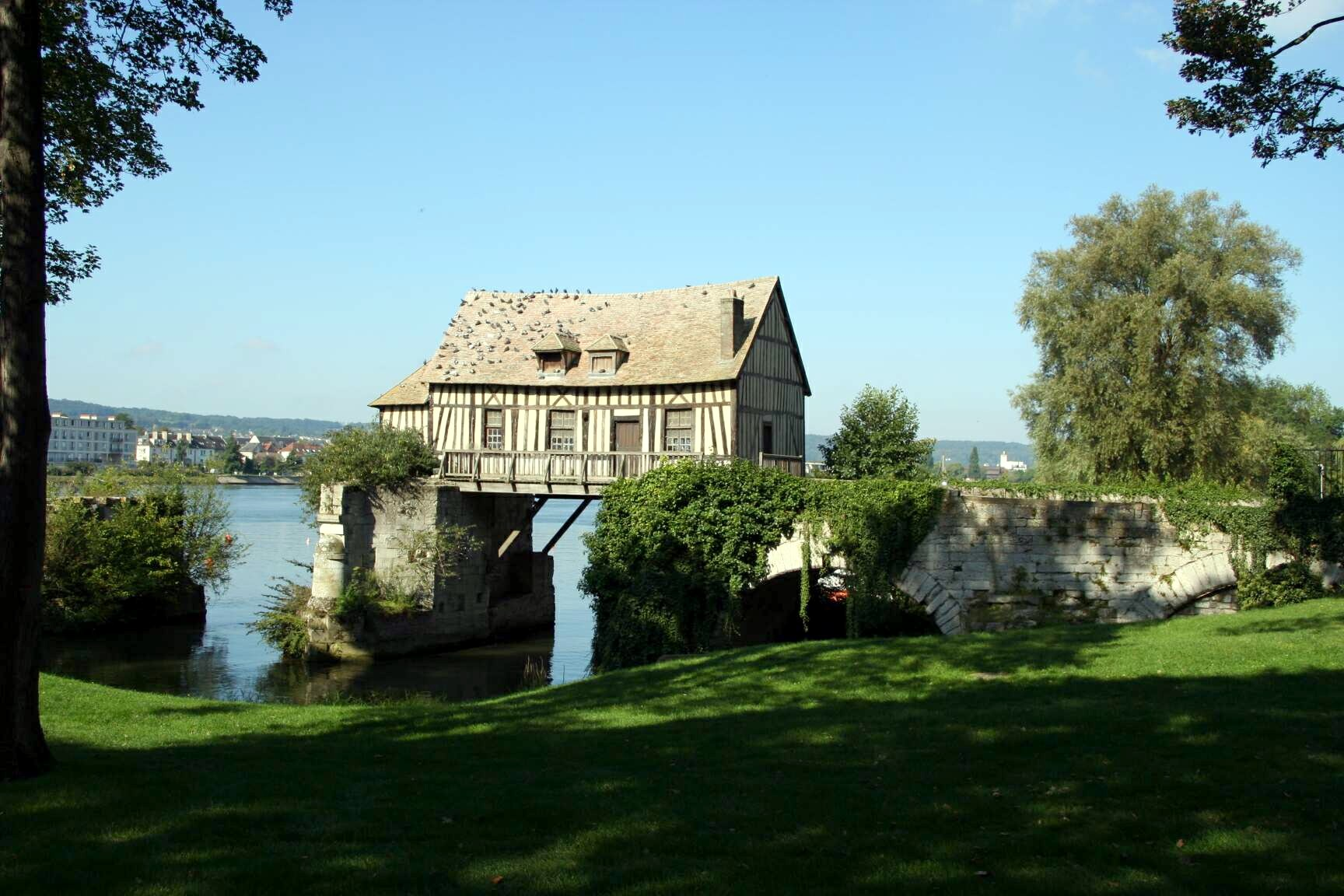 Le vieux moulin à Vernon - Eure (France)